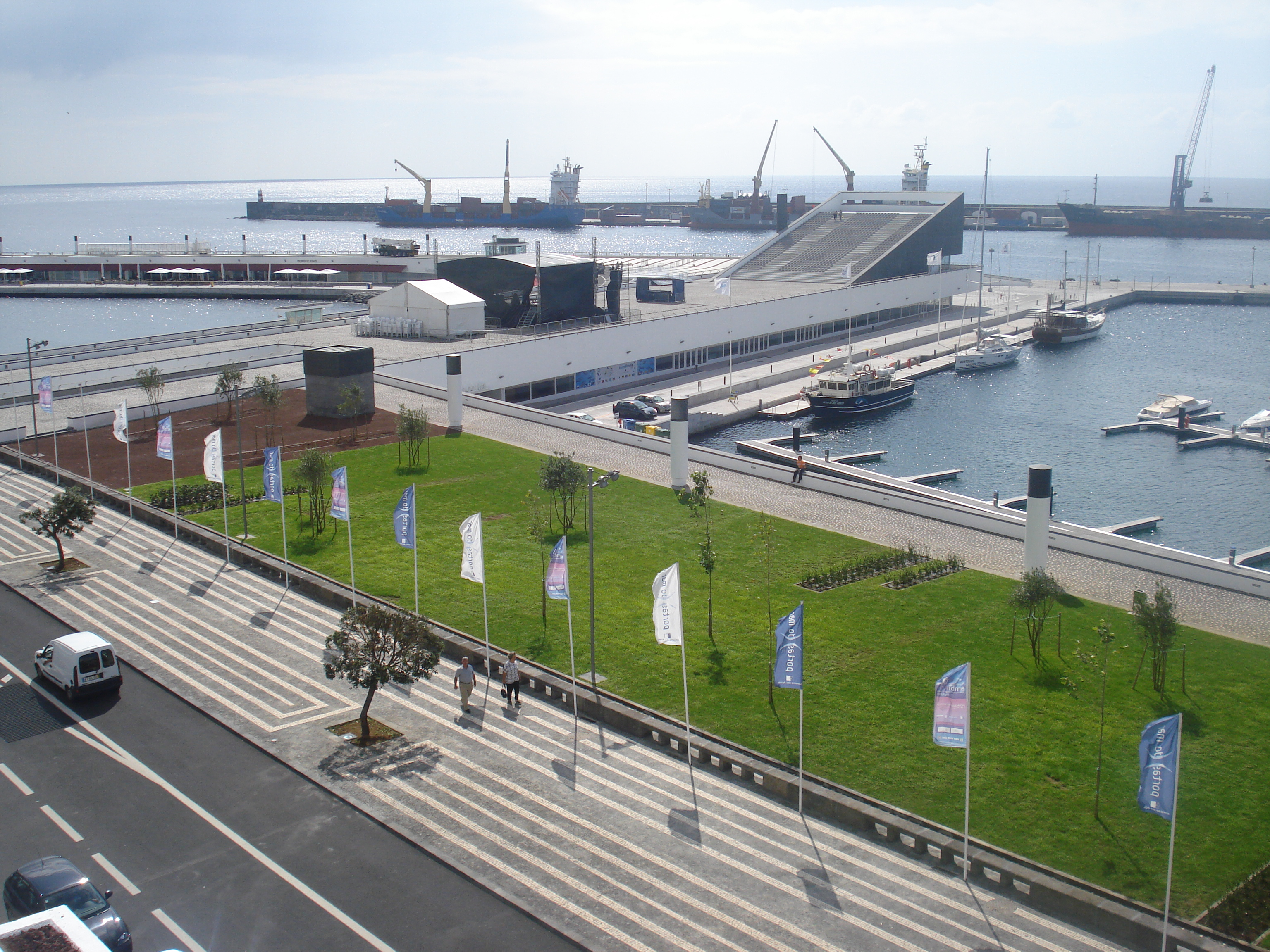 Vista para a marina de Ponta Delgada